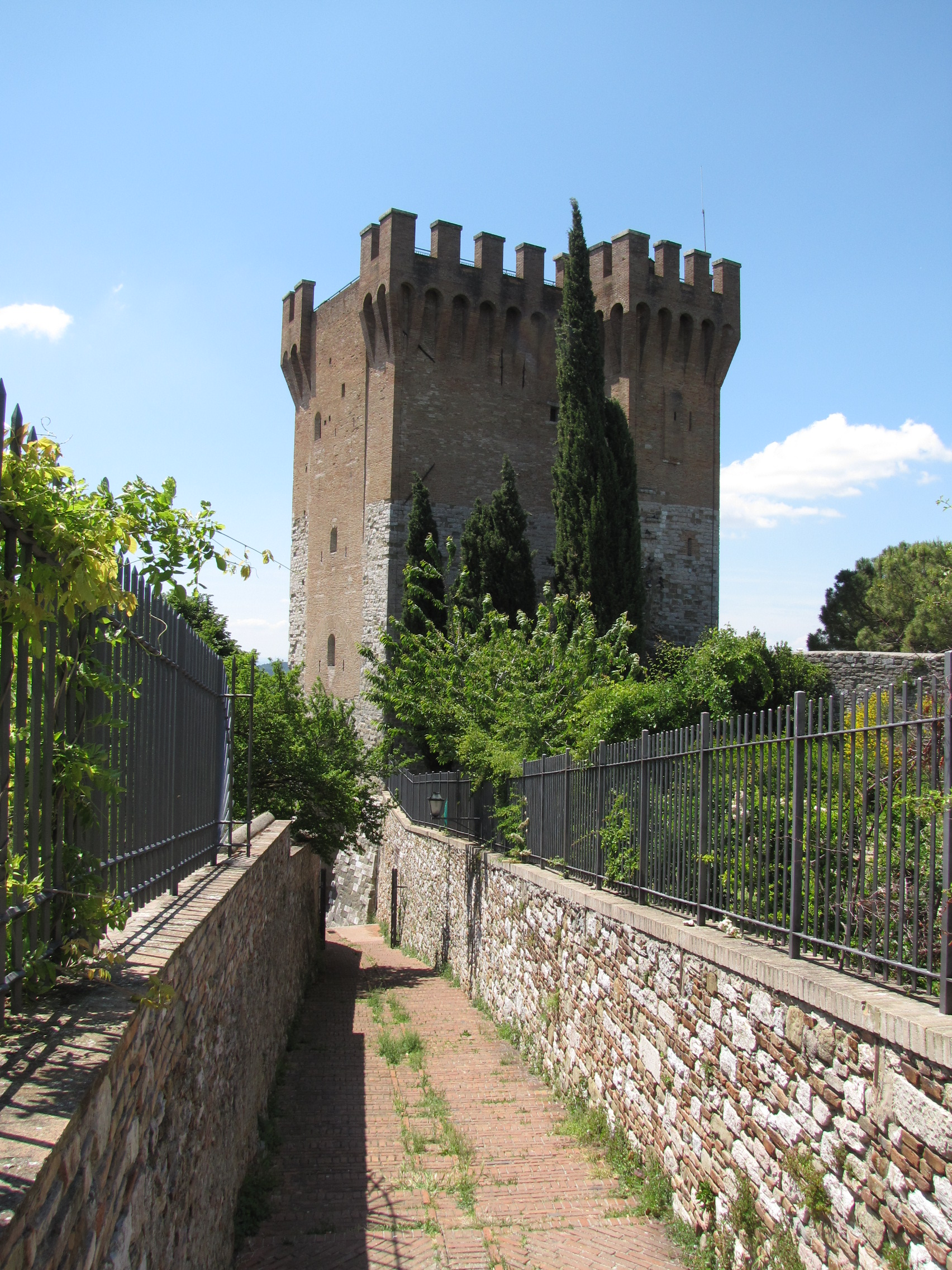 Perugia - Via Garibaldi